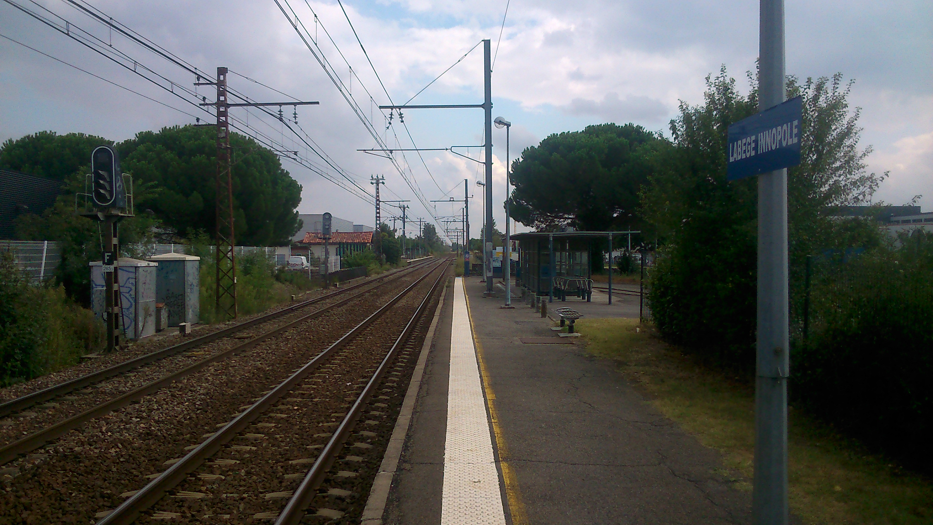 Halte ferroviaire de Labège-Innopole (Station de la ligne F)